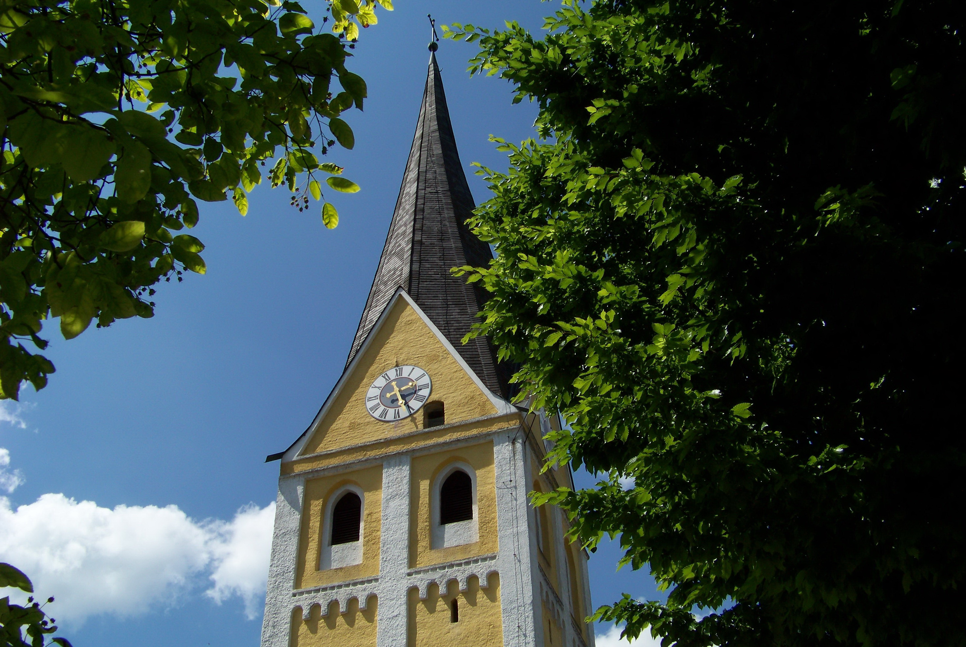 Landshut, Münchnerau, Kath. Kirche St. Petrus; spätromanischer Chorturmbau, 12./13. Jh. Bemerkenswert ist der massive, viergeschossige Turm. An den drei unteren Stockwerken Rundbogenfriese zwischen Lisenen. Über jedem Fries das Deutsche Band. Im späteren Obergeschoß spitzbogige Schallöffnungen. Spitzhelm über vier Giebeln mit Zifferblättern.